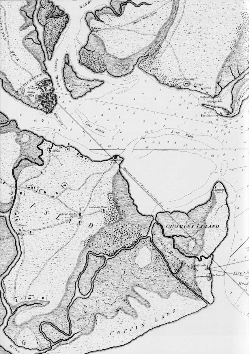 Charleston Harbor in 1776.